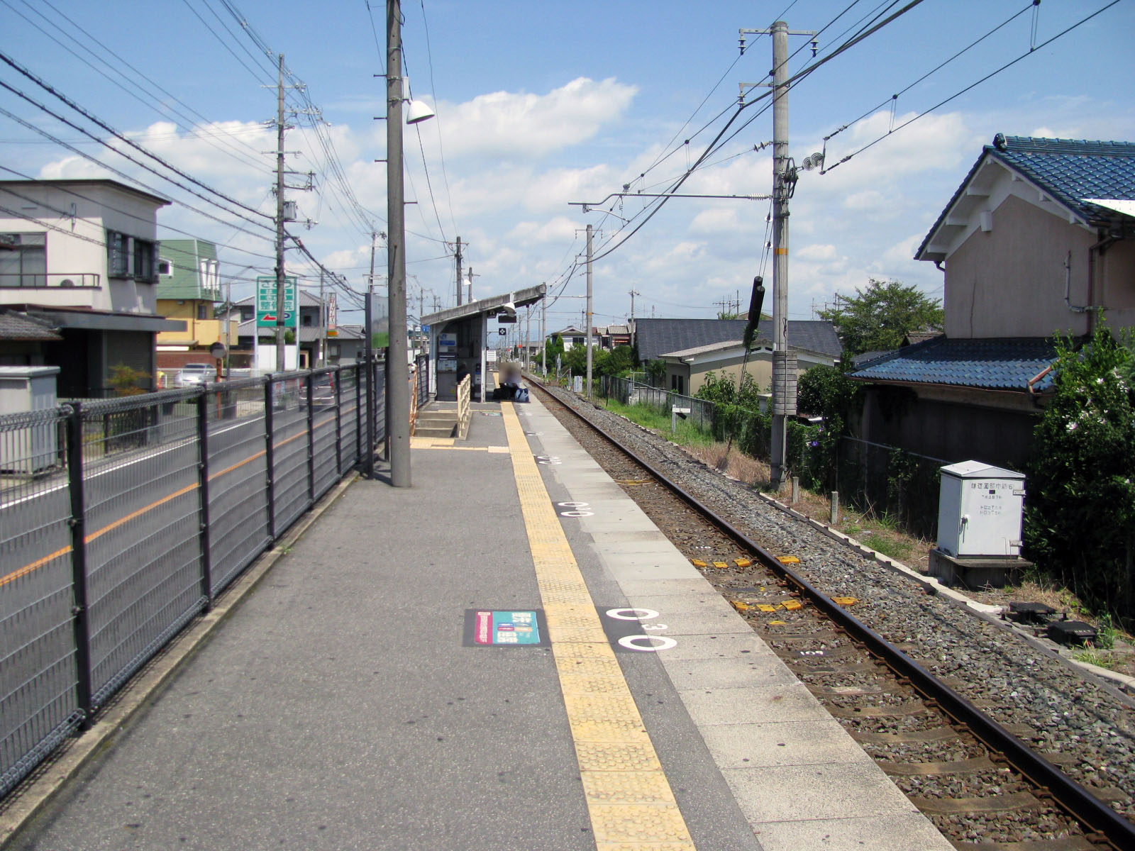 JR学研都市線下狛駅